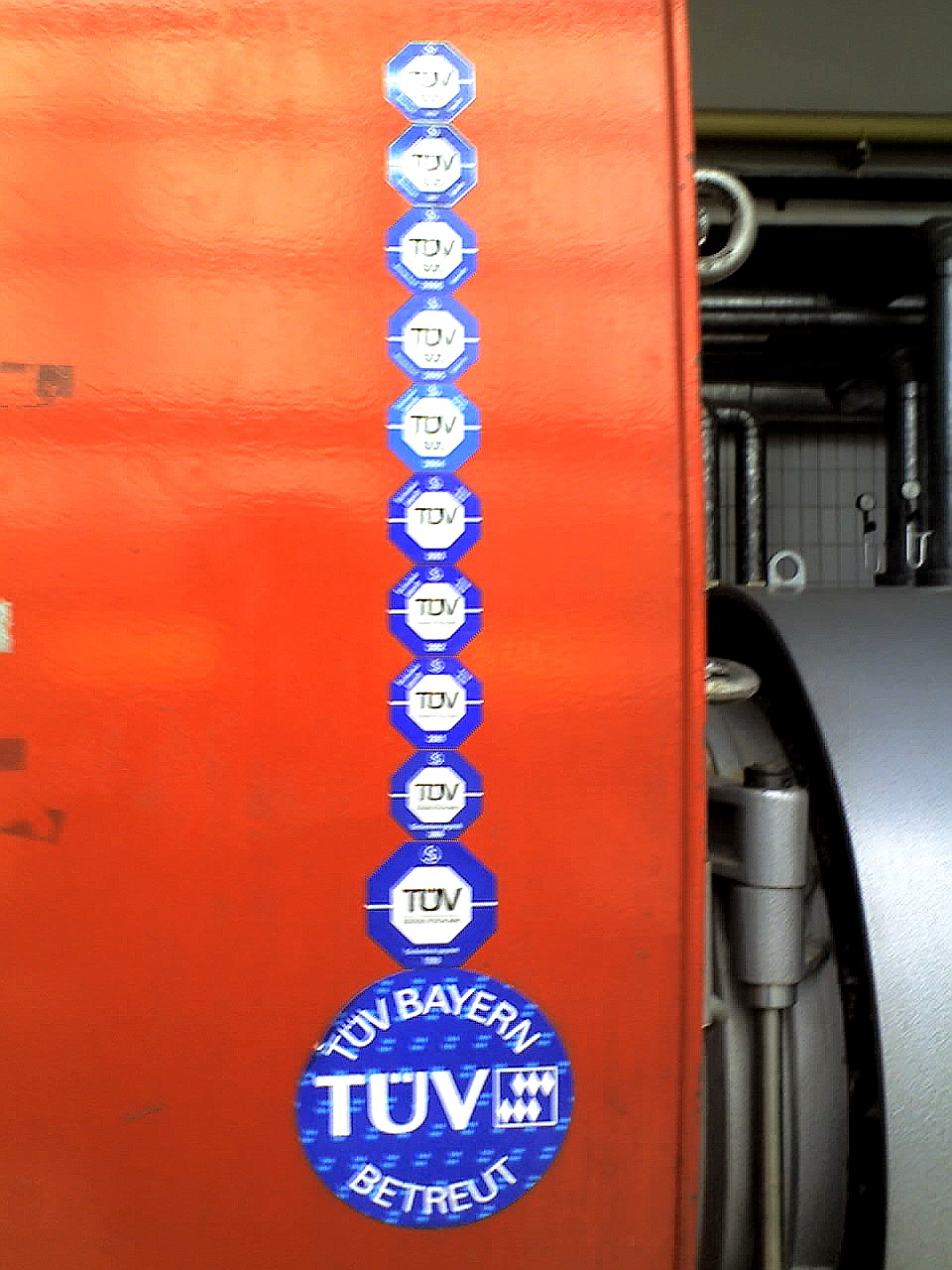 TÜV-Plaketten eines Flammrohrrauchrohkessel